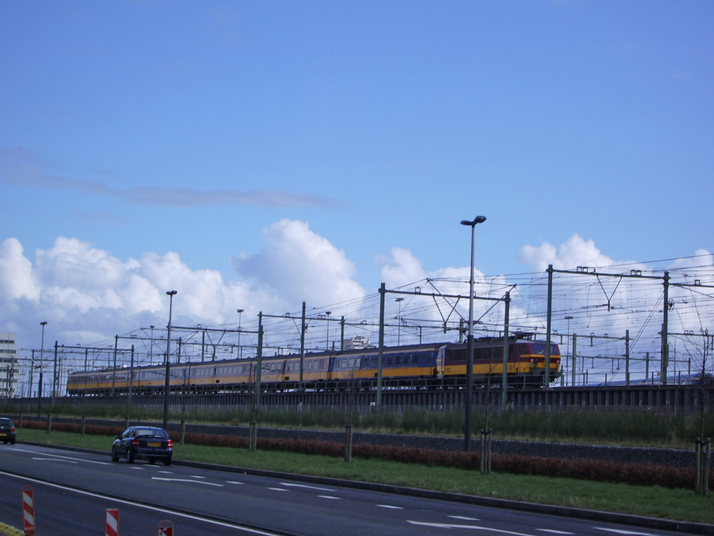 Beneluxtrein